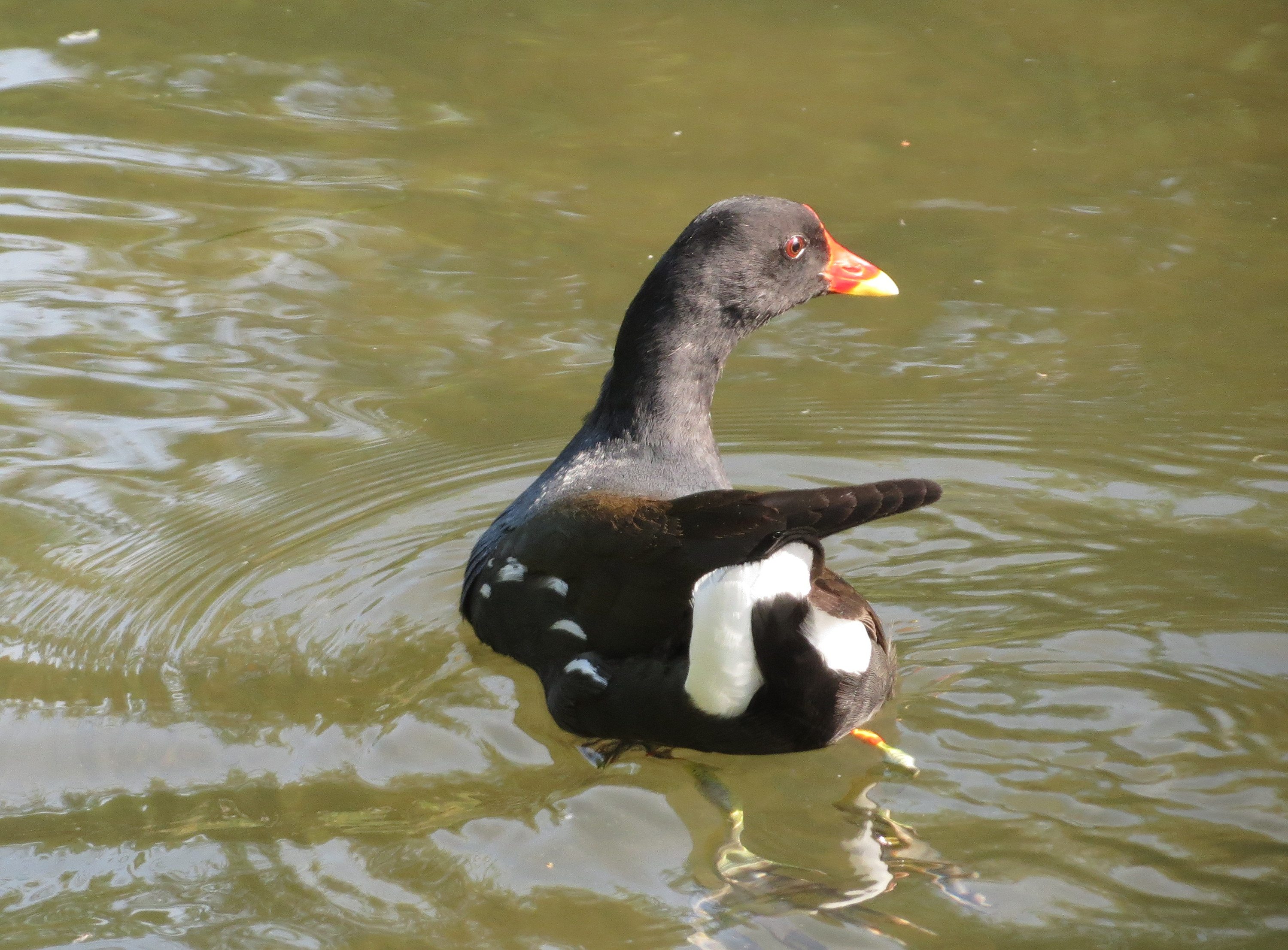 Teichralle (Gallinula chloropus) am Kraichbach in Hockenheim